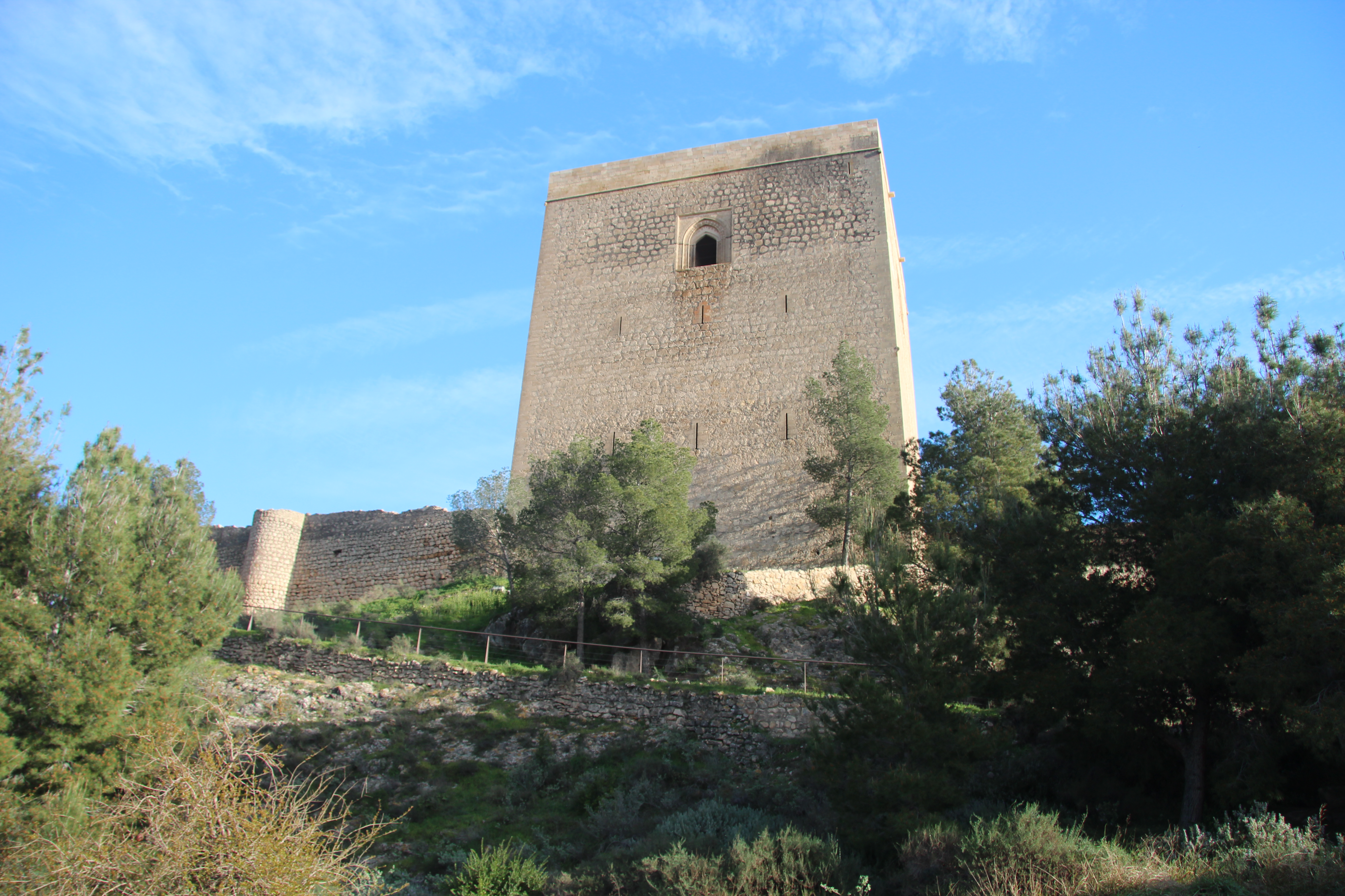 Castle of Lorca